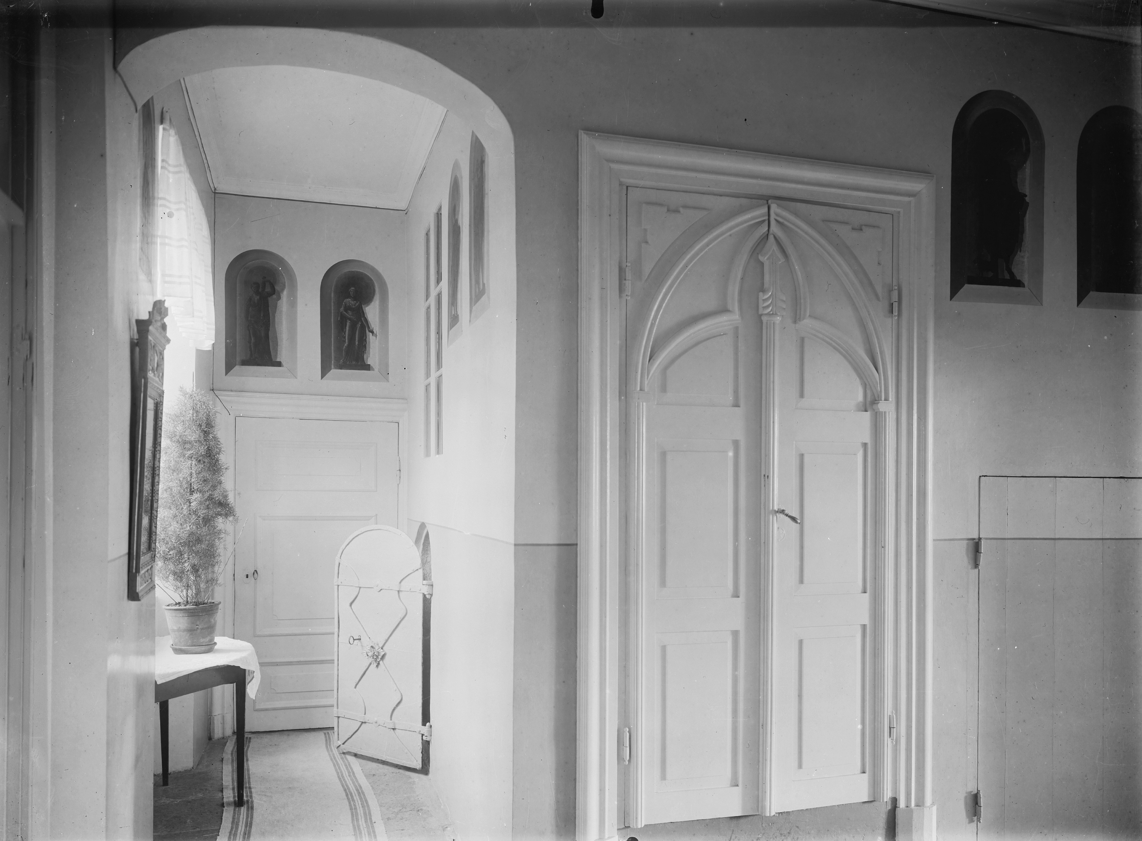 Naantalissa sijaitsevan Lapilan kartanon eteishalli, Vasemmalla oleva ovi johtaa kartanon isännän huoneeseen,ja pieni ovi eteiskomeroon. Pariovista kuljetaan toiseen kerrokseen nousevaan portaikkoon. Pariovet ovat peräisin 1863 tehdystä korjauksesta.. Kuva 1910-luvulta. Kuvatietoja: Organisaatio: Museovirasto - Musketti Kokoelma: Historian kuvakokoelma Inventaarionro: HK10000:4973 Mitat: 18 x 24 cm Kuvaustiedot: 1910-luku Lapilan kartano,Naantali Kuvaaja: Signe Brander